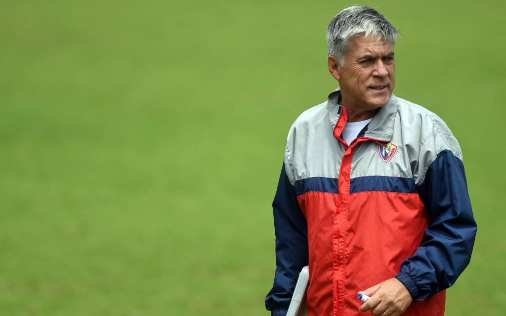 entrenamiento